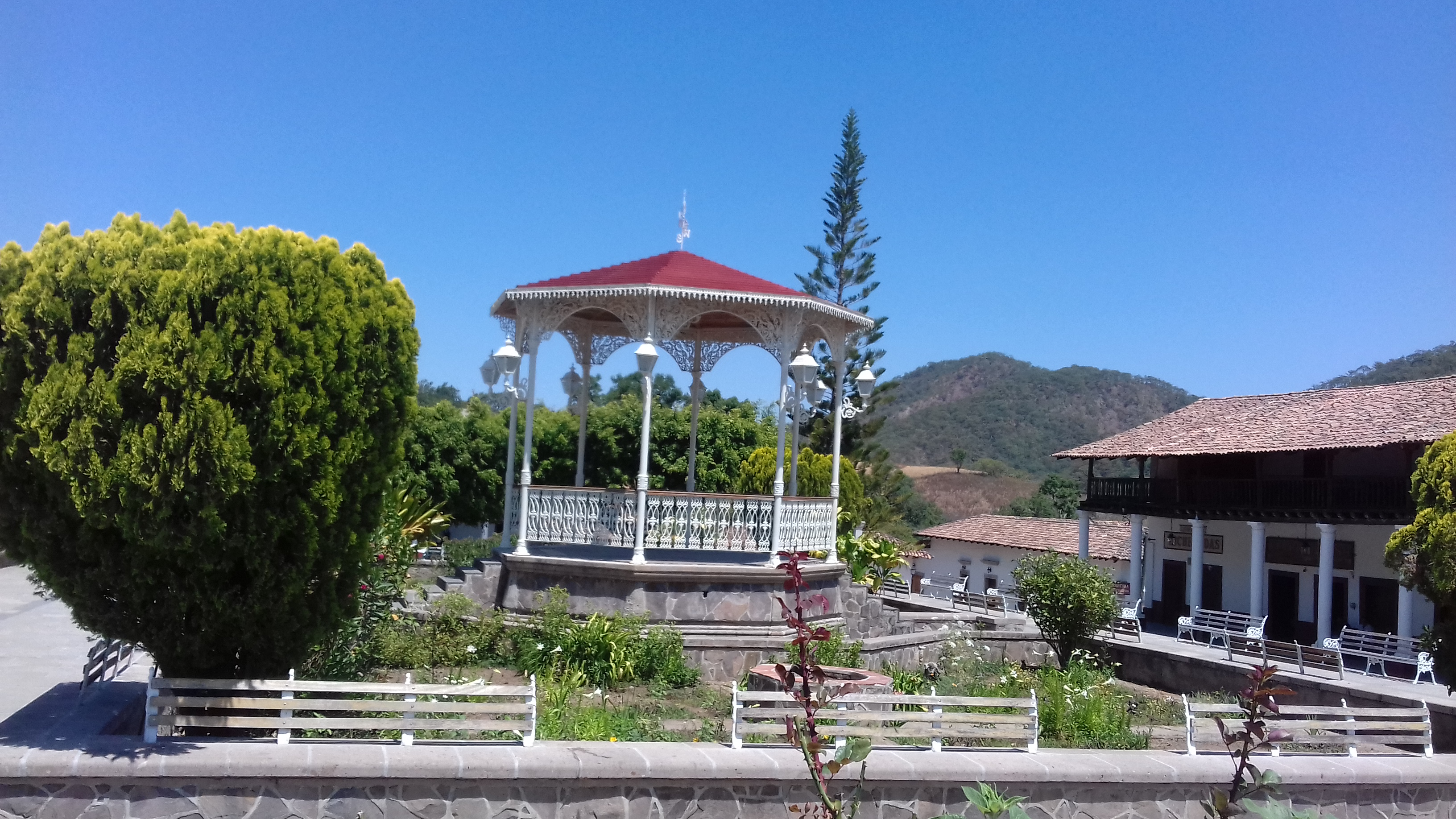 Plaza en pueblo mágico "San Sebastián del Oeste", Jalisco, México.